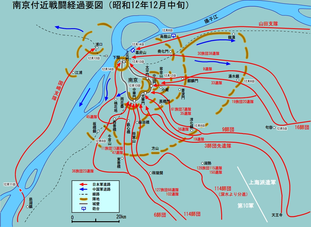 南京戦闘経過要図 1937年12月上旬